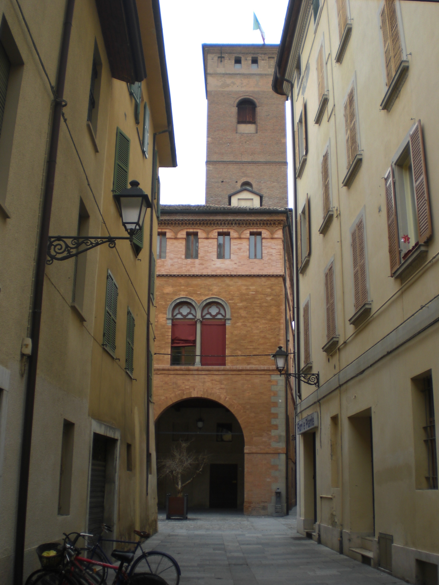 Piazza casotti e Torre del Bordello